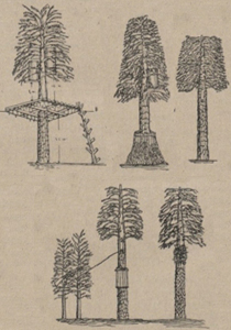 Беларуская (тарашкевіца): Ахова борцей і калод